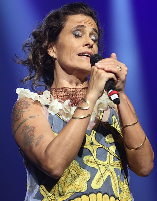 Zélia Duncan - 26° Prêmio da Música Brasileira 2015, no Theatro Municipal, no Centro do Rio de Janeiro/RJ. (10/06/15) Foto: Roberto Filho/Divulgacão